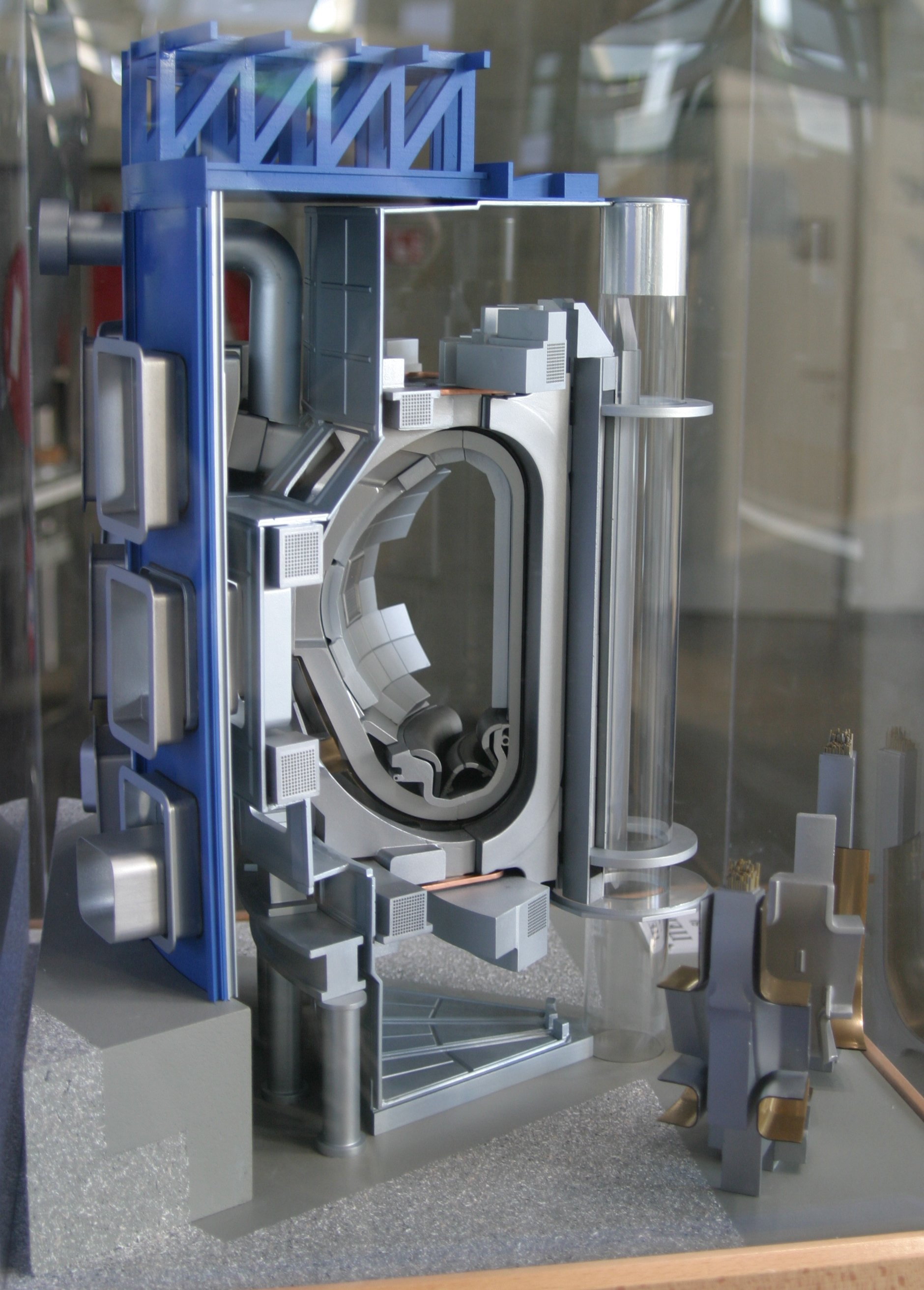 ITER